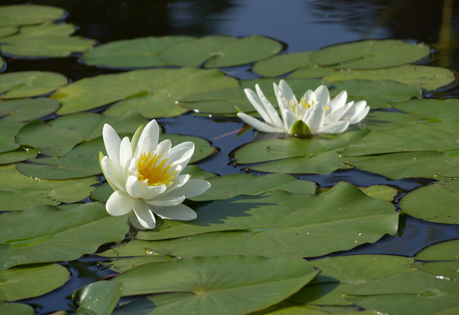 grzybienie białe